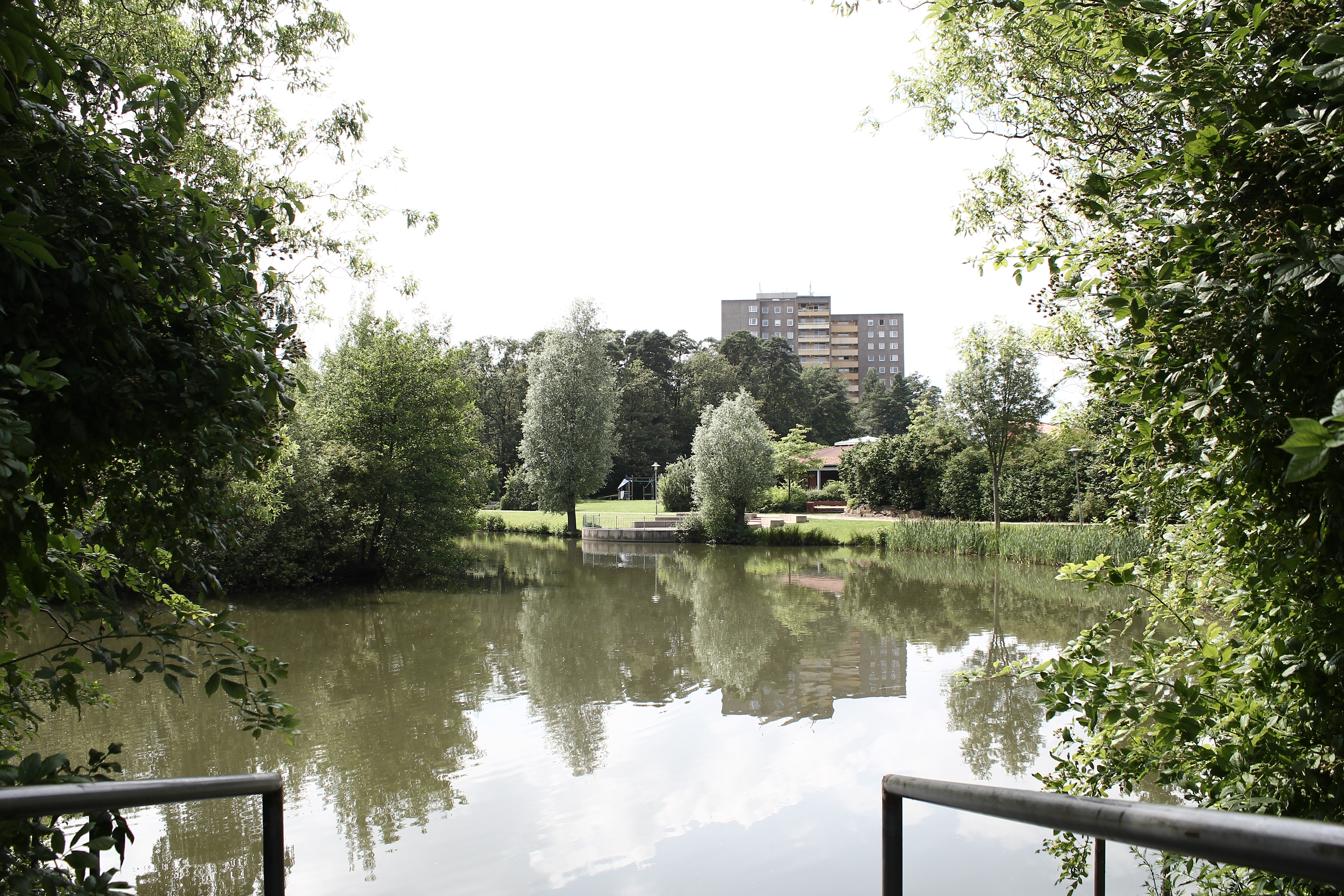 Gabelweier in Espelkamp